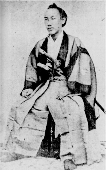 堀田正倫の肖像写真。